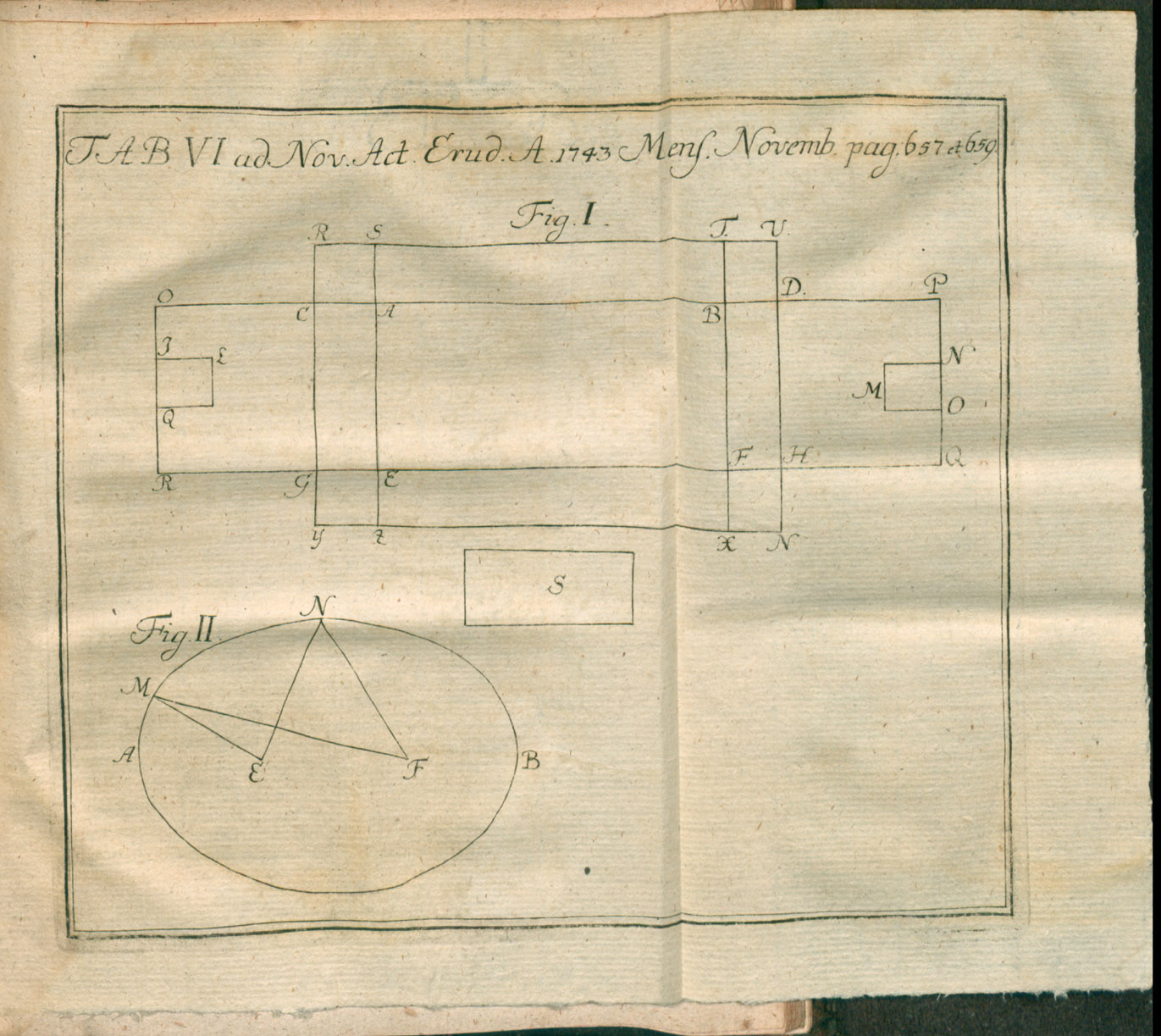 Illustration